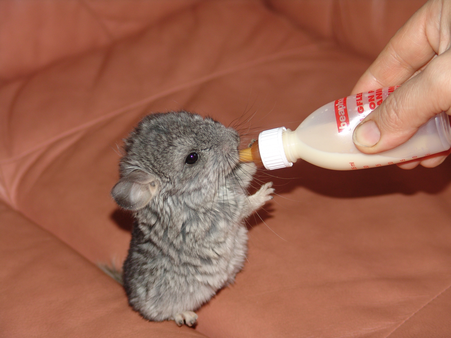 Искуственное вскармлевание детёныша шиншиллы.